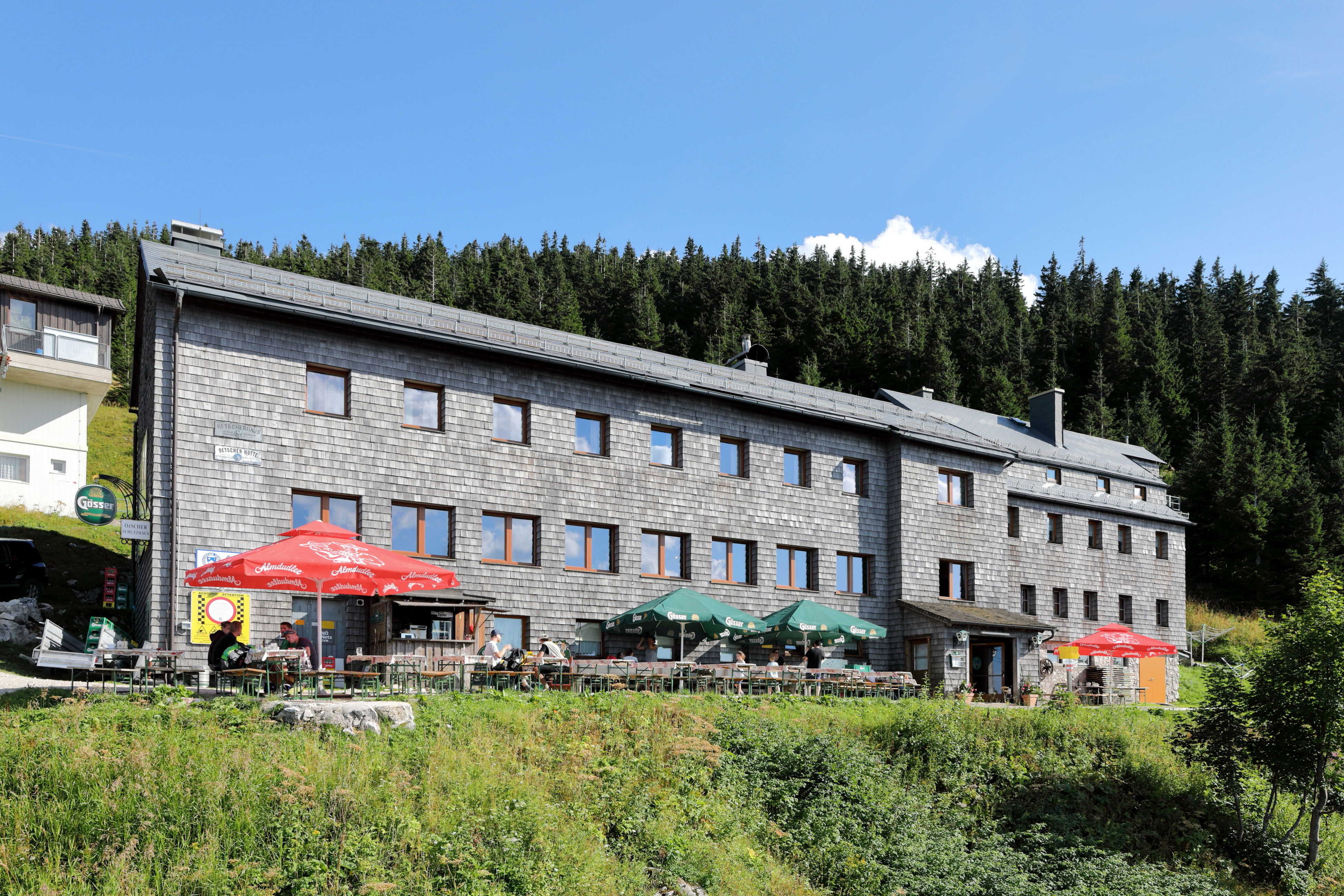 Das Ötscherschutzhaus am Ötscher auf 1418 m in Lackenhof, ein Ortsteil der niederösterreichischen Marktgemeinde Gaming. Das Schutzhaus wird vom Österreichischen Touristenklubs betrieben und wurde am 29. Mai 1887 eröffnet.